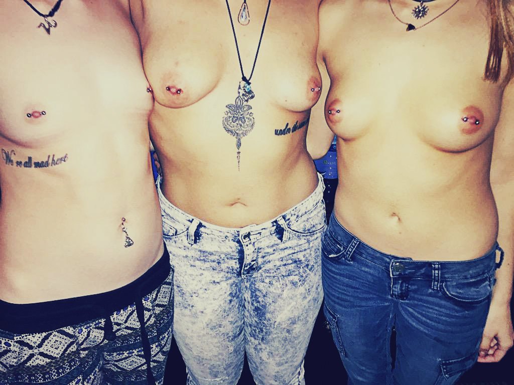 We got our nipples pierced